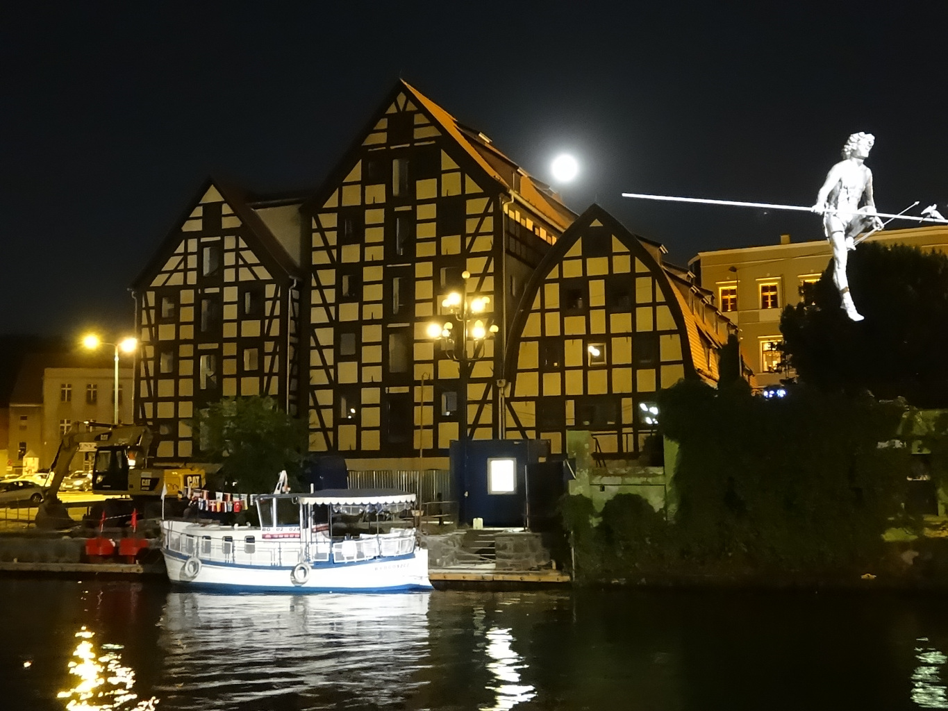 Spichrze nad Brdą w Bydgoszczy, zbud. w latach 1793-1800, od 1964 r. w gestii Muzeum Okręgowego